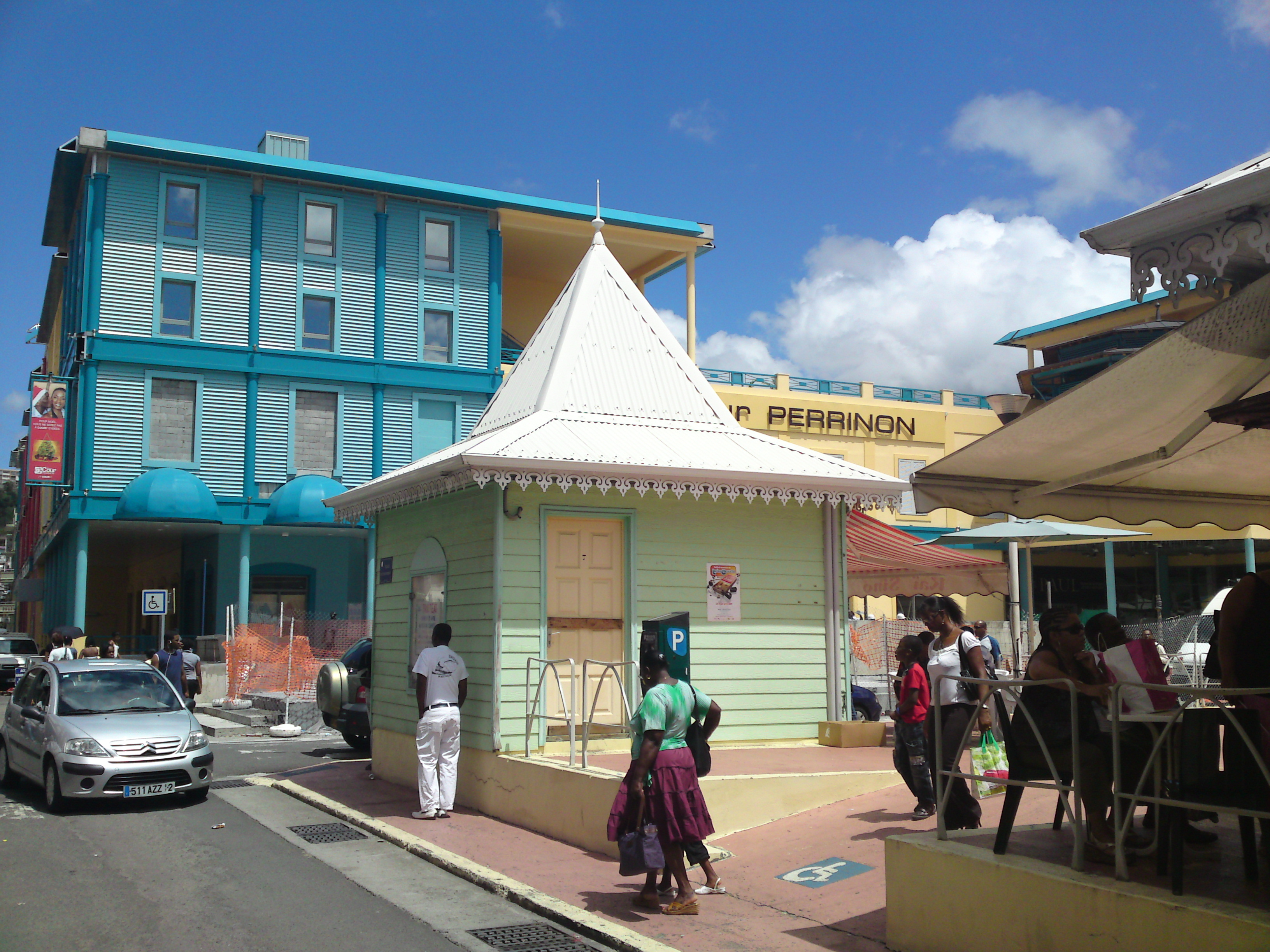 centre commercial Perrinon avril 2009. Les travaux continuent sur le place de l'enregistrement qui devrait faire l'objet d'un réaménagement global